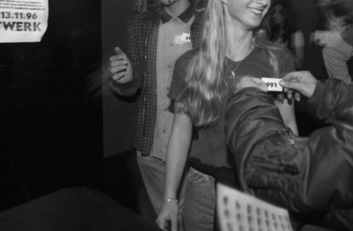 Single Party in Augsburg, Bayern. Bild aus einer Serie, Veröffentlicht in: x-mag (ISSN: 1434-8535) 02/1997, Seite 36–37: Flirt connection